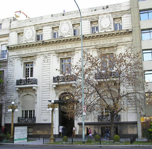 Subsede Cerrito de la Universidad Austral